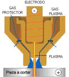 boquilla para la formacion del plasma